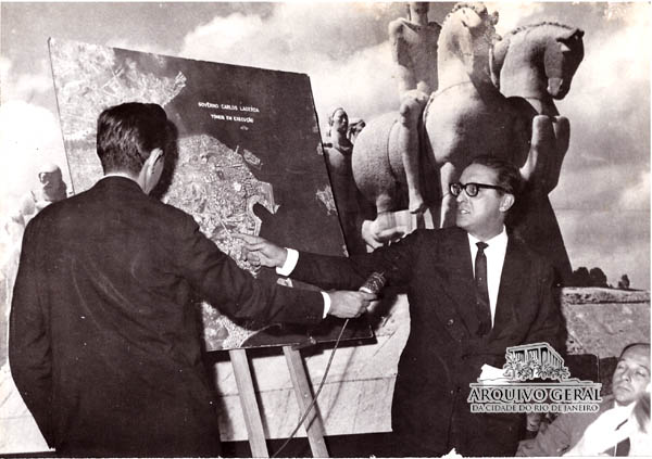 EXPOSIÇÃO DO PROJETO DE CONSTRUÇÃO DO TÚNEL CATUMBI - LARANJEIRAS (SANTA BÁRBARA)